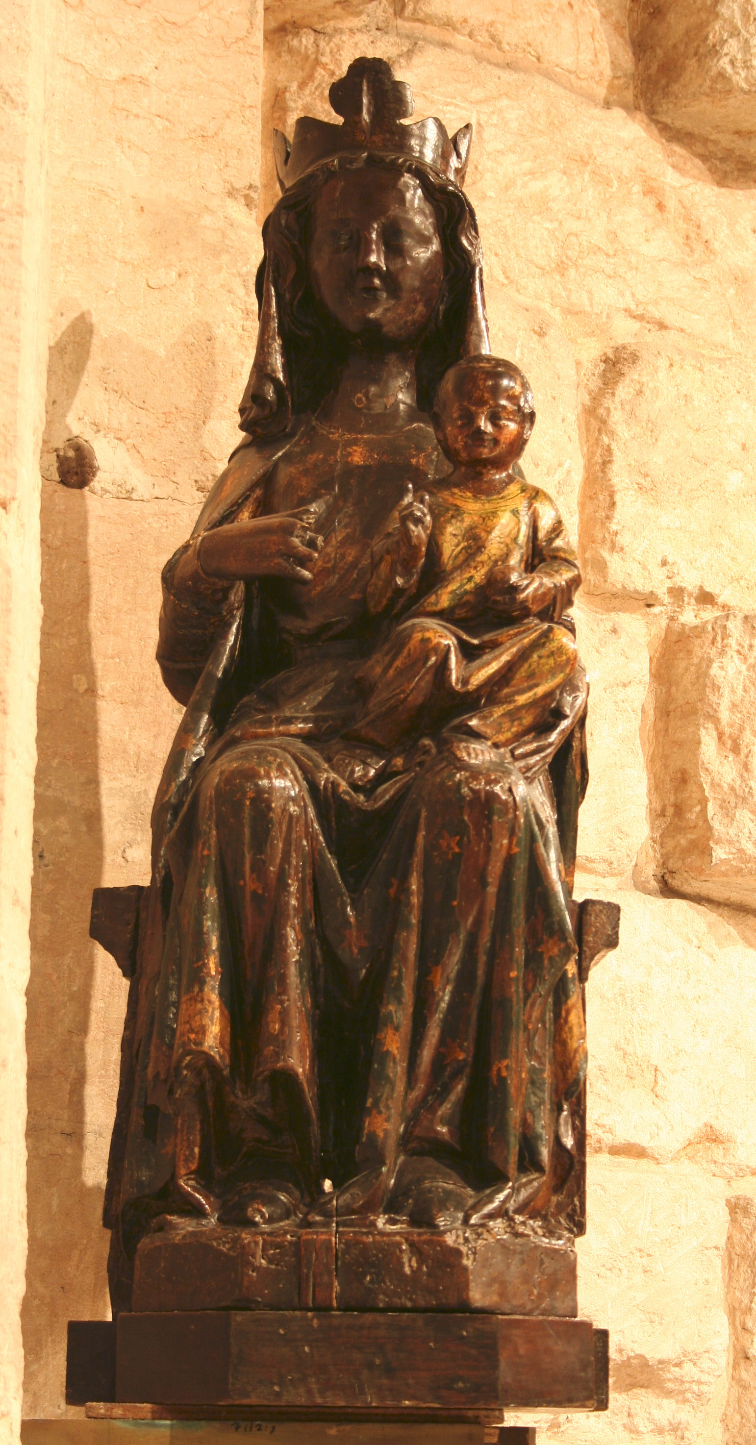 Statue de la vierge noire en noyer datant du XIVe siècle se trouvant dans la crypte de l'abbaye de Saint-Victor à Marseille (Bouches-du-Rhône)